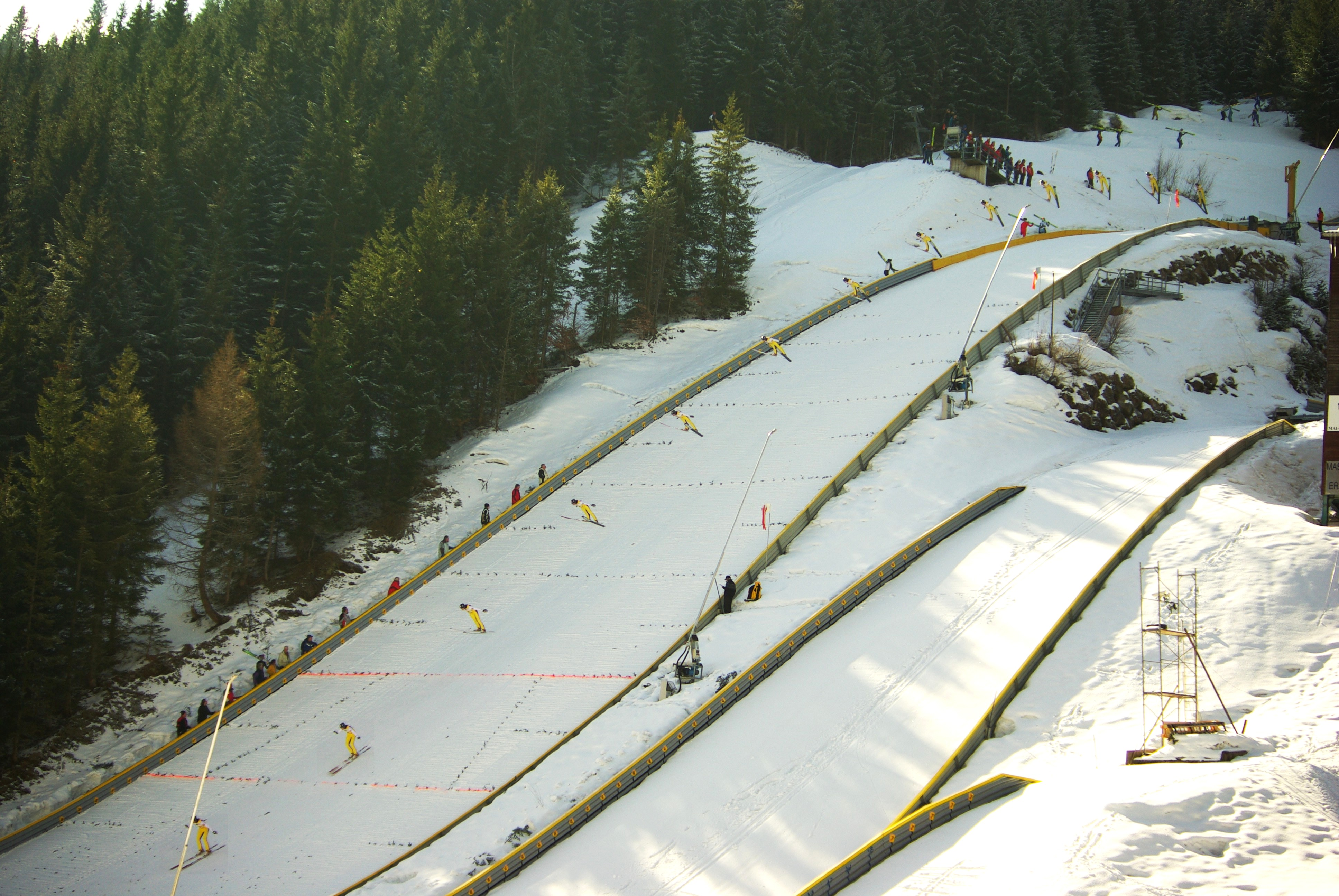 Sprungstudie des österreichischen Nordischen Kombinierers Marco Pichlmayer während des Skisprung-Probedurchgangs des Sprint-Bewerbes im B-Weltcup in Eisenerz, Österreich am 9. März 2008. Das Bild ist aus 13 Einzelbildern, aufgenommen in einem Abstand von etwa 1/3 Sekunde, zusammengesetzt (Sprungweite: 97m, Schanze: K-Punkt: 90m, Hill Size: 100m).